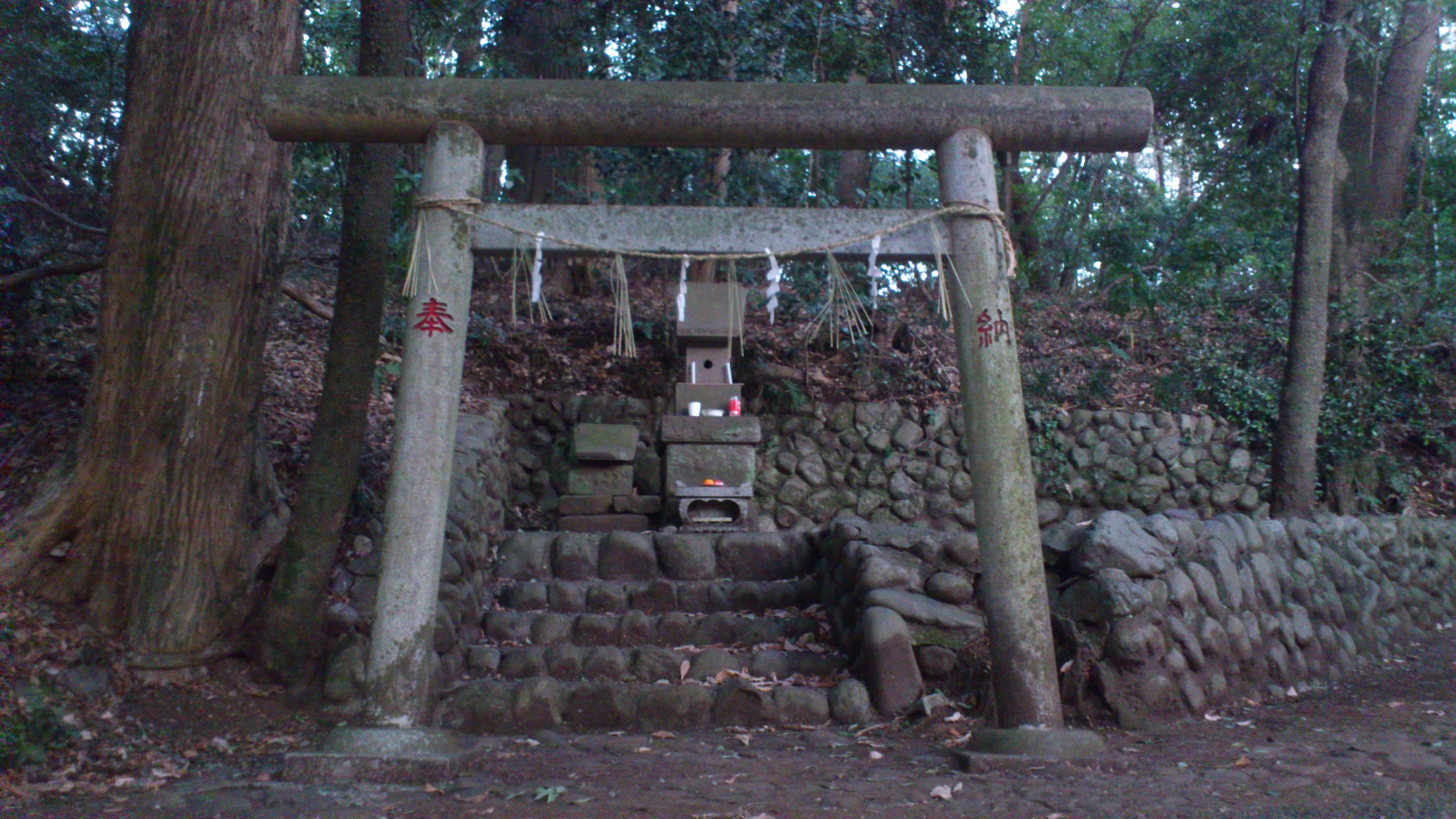 神奈川県相模原市南区磯部に鎮座する有鹿神社の奥宮。本宮は海老名市上郷にある。